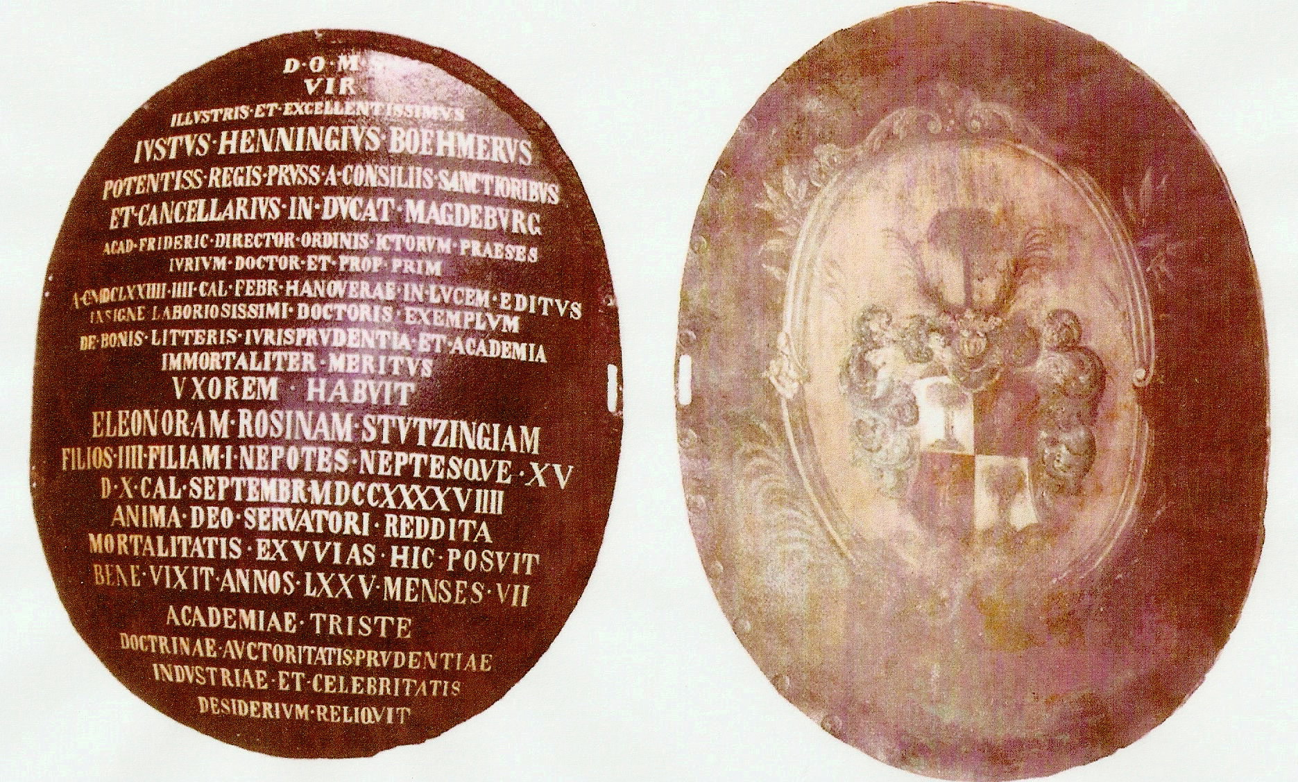 Gruftschilde an der alten Gruft von Justus Henning Boehmer